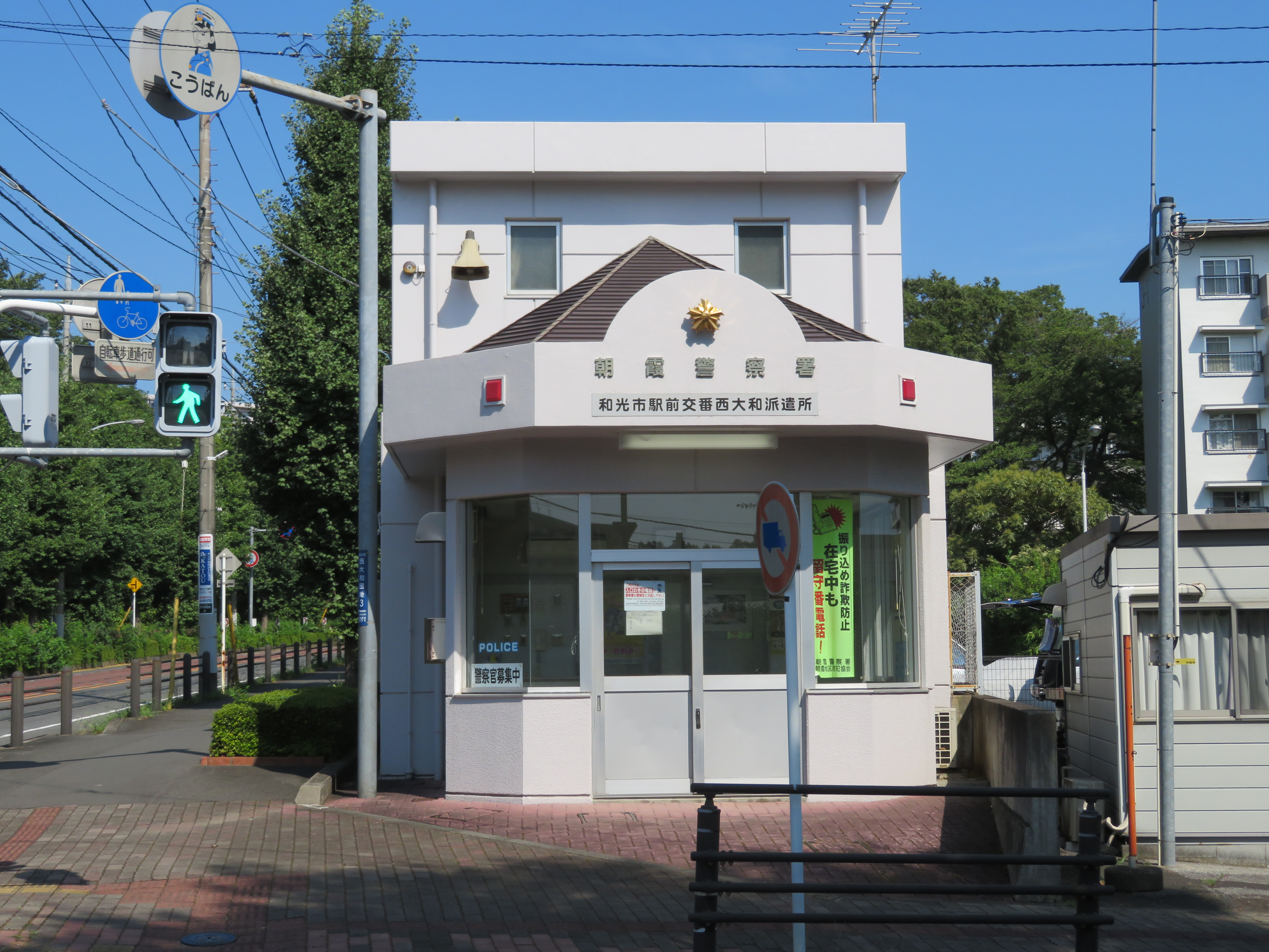 朝霞警察署和光市駅前交番西大和派遣所（旧西大和交番）